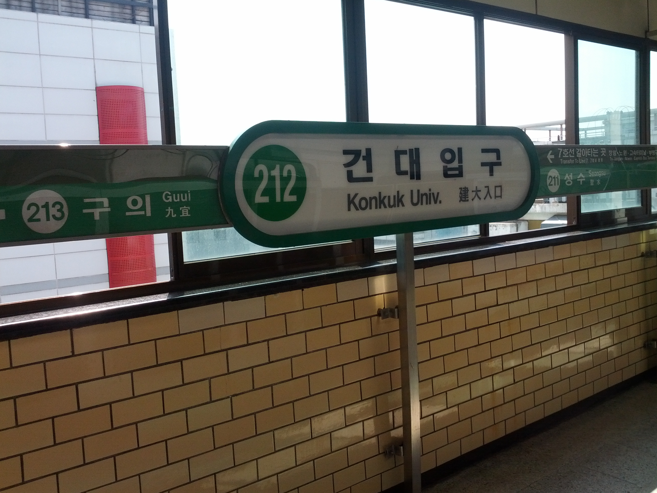 2호선 건대입구역 역명판